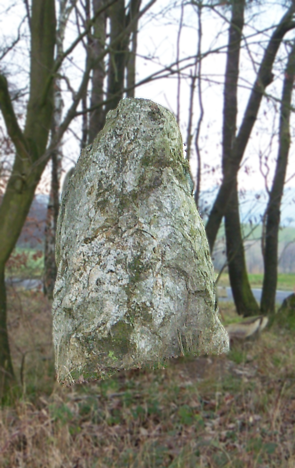 Schönberg, Landkreis Bernkastel-Wittlich, Menhir an der Trafostation (und an der Zufahrtststraße zum Ort)